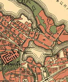 центр Сестрорецка СПб до 1917 года